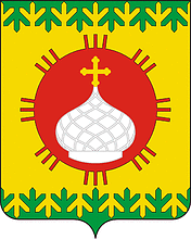 Герб посёлка Троицко-Печорск, Коми